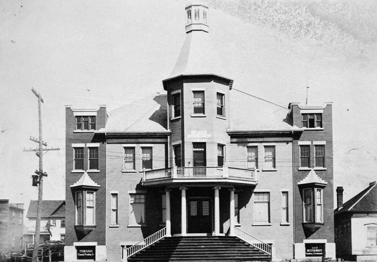 Title / Titre : à 314 Bay Street (Finnish newspaper "Tyokansa", and soon the Finnish Labour Temple "Tyon Temppeli") / Le 314 Bay Street, abritant le journal finnois Tyokansa et les futurs locaux du Finnish Labour Temple, Tyon Temppeli Creator(s) / Créateur(s) : E. L. Lane Date(s) : 1910 Reference No. / Numéro de référence : MIKAN 3210886 Location / Lieu : Port Arthur, Ontario, Canada Credit / Mention de source : E. L. Lane. Library and Archives Canada, C-095456 / E. L. Lane. Bibliothèque et Archives Canada. C-095456